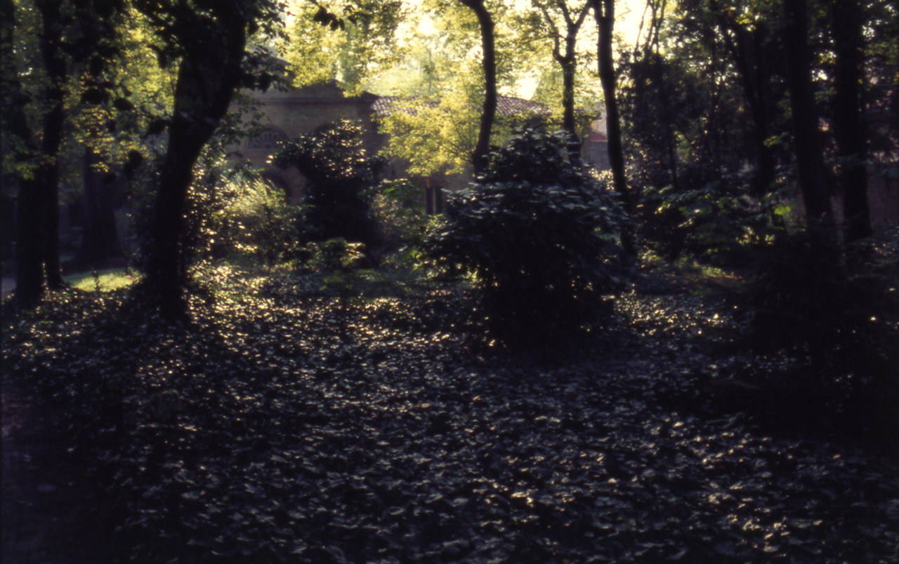 Servizio fotografico : Ferrara, 1982 / Paolo Monti. - Strisce: 6, Fotogrammi complessivi: 6 : Diapositiva, sviluppo cromogeno/ pellicola ; 35 mm. - ((Sul portanegativi: "Ferrara. pezzi 137". - Fonte: Rubrica di Paolo Monti: Diapositive 24x36mm (1948-1982), presso Archivio Paolo Monti. Rubrica con elenco soggetti e numeri di inventario (da 1 a 1000) corrispondenti ai fogli a tasche in pvc in cui sono contenute le diapositive.